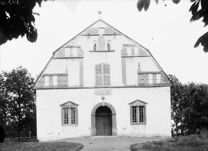 Kyrkan från väster.